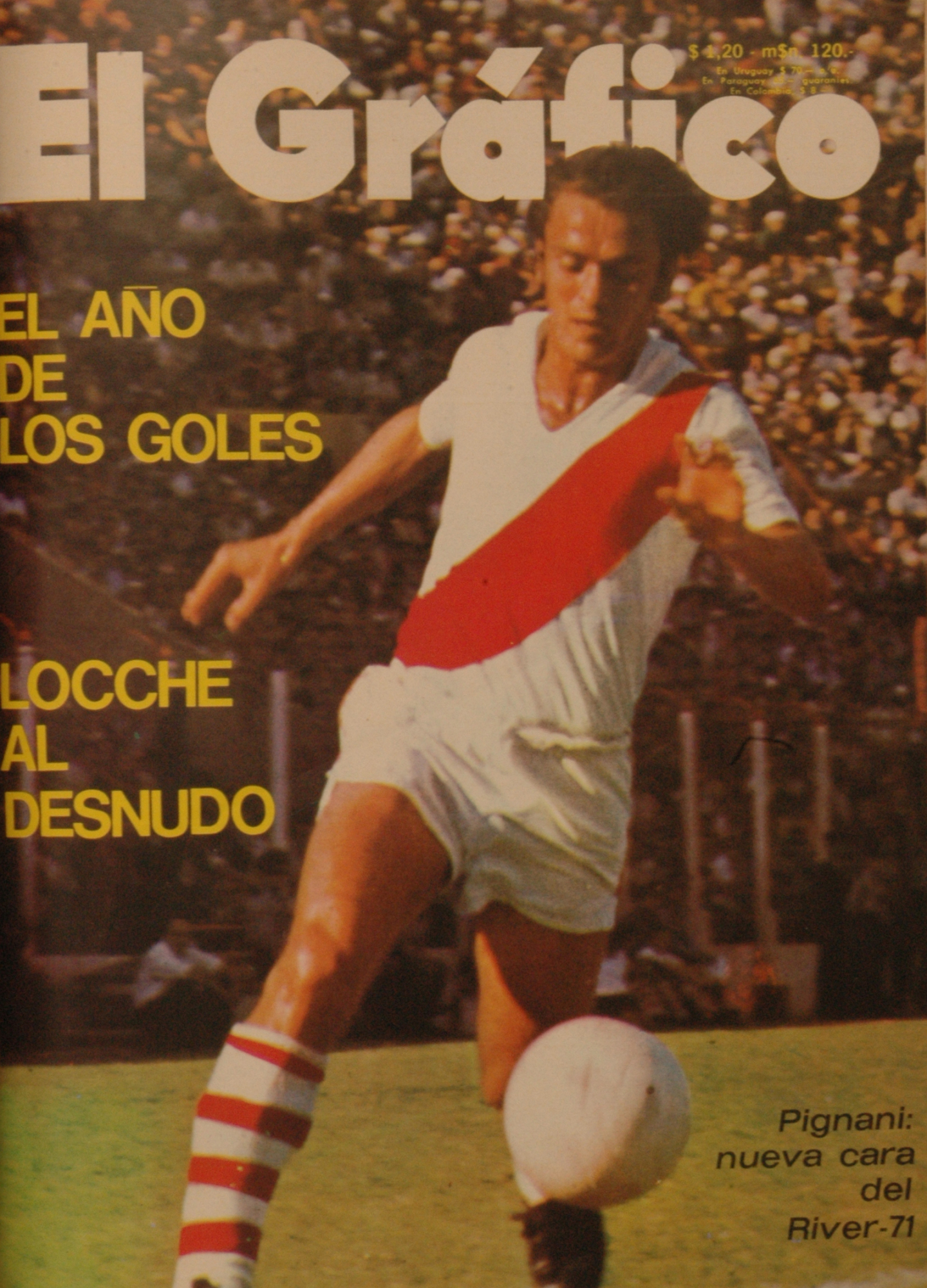 El Grafico del 13 de Abril de 1971. Edicion 2688